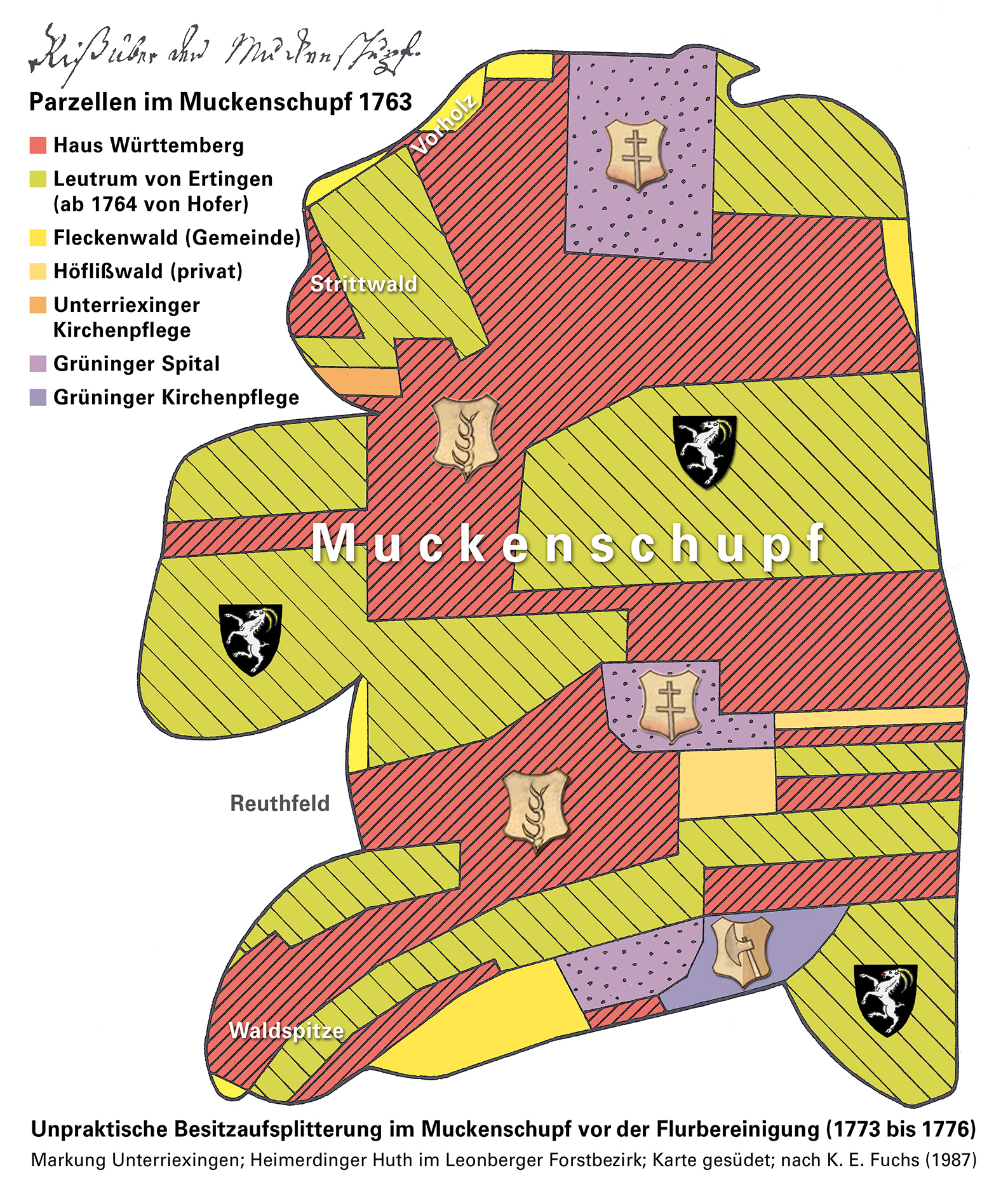 Unpraktische Besitzaufsplitterung des Muckenschupfs 1763 auf Markung Unterriexingen, Heimerdinger Huth im Leonberger Forstbezirk (1773 bis 1776 flurbereinigt). Die Karte ist wie das Original gesüdet; Quelle: Karl Erwin Fuchs: Grenzsteine der Stadt Markgröningen, Markgröningen 1987, S.89.